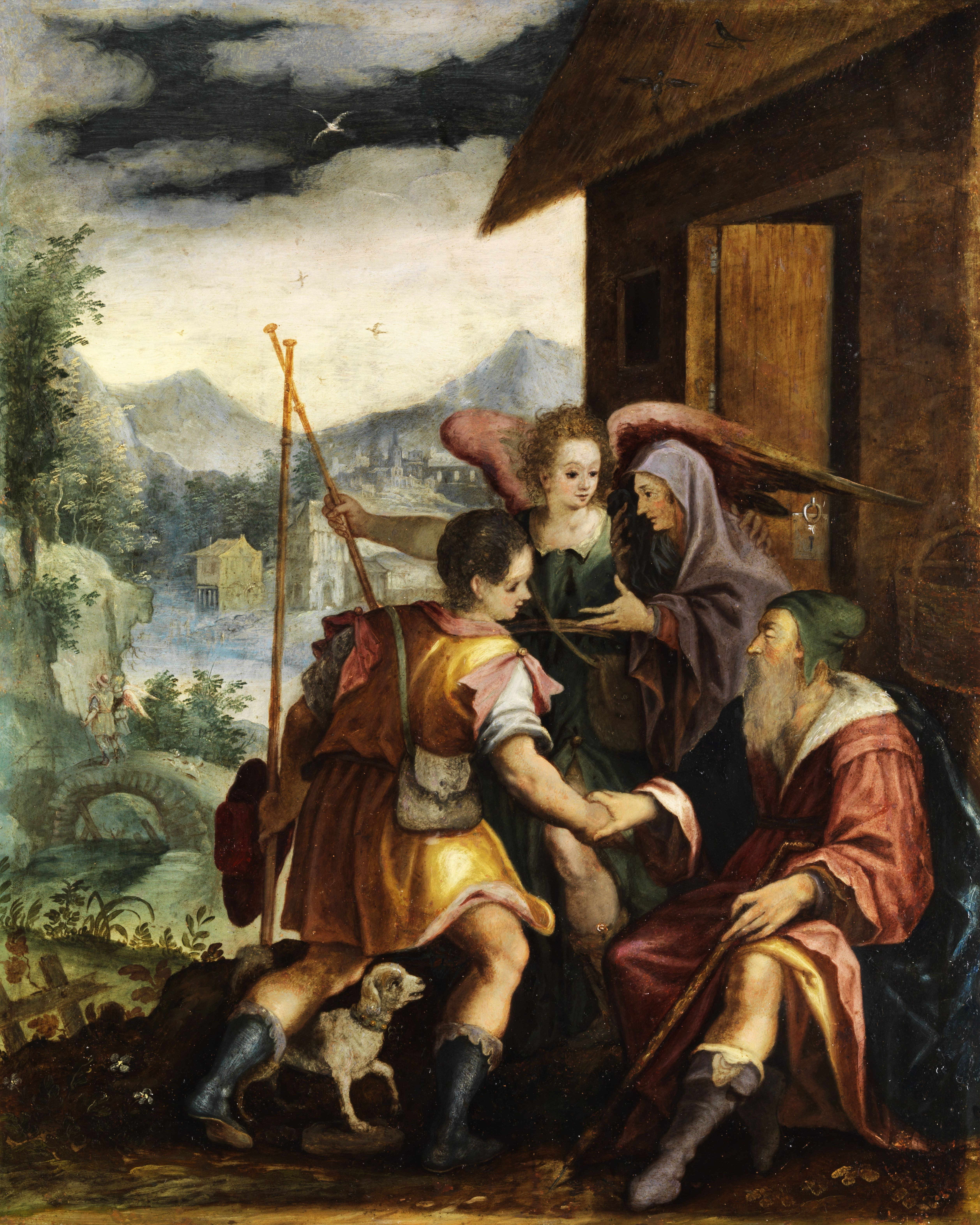 Tobias en Rafaël nemen afscheid van Tobit en Anna